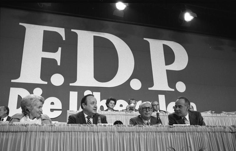 FDP-Bundesparteitaag 1975 in der Rheingoldhalle, Mainz